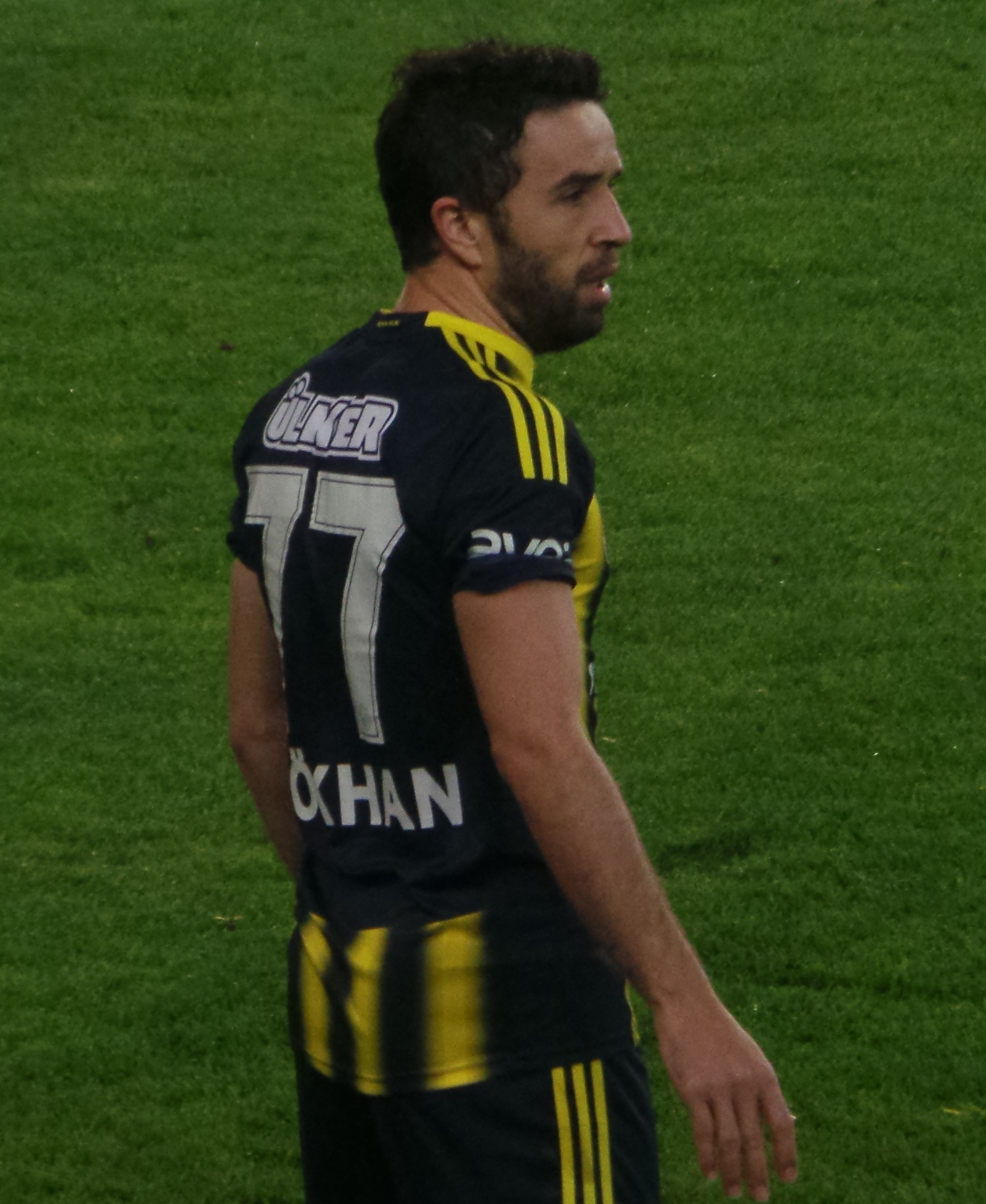 Gökhan Gönül FB